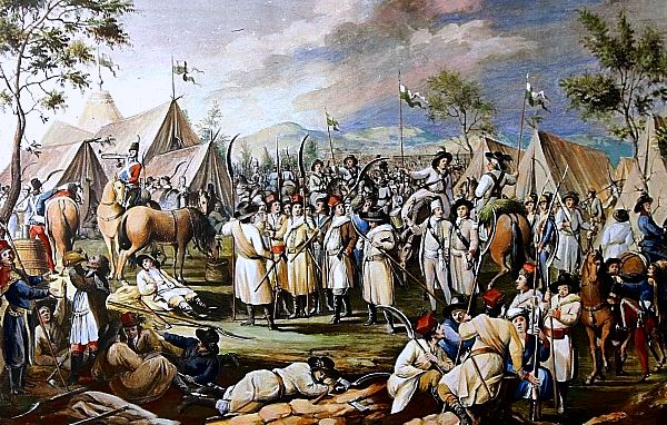 Obóz Kościuszki pod Bosutowem, obraz Michała Stachowicza